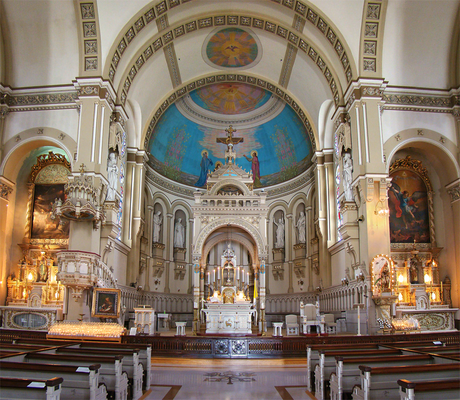 Basilique Sainte-Anne, Varennes, Montérégie, Québec, Canada.